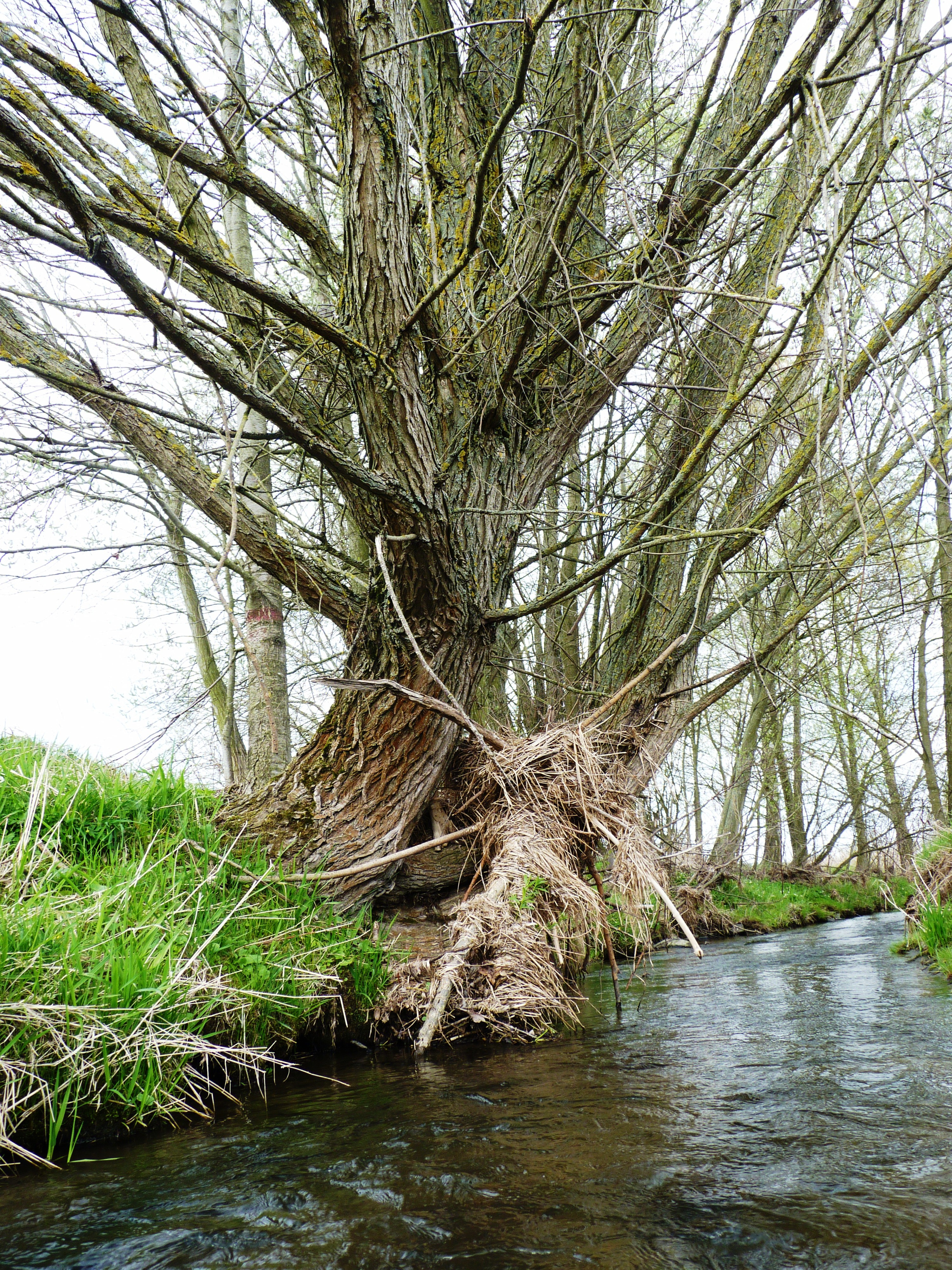 Přírodní památka Chodská Úhlava.